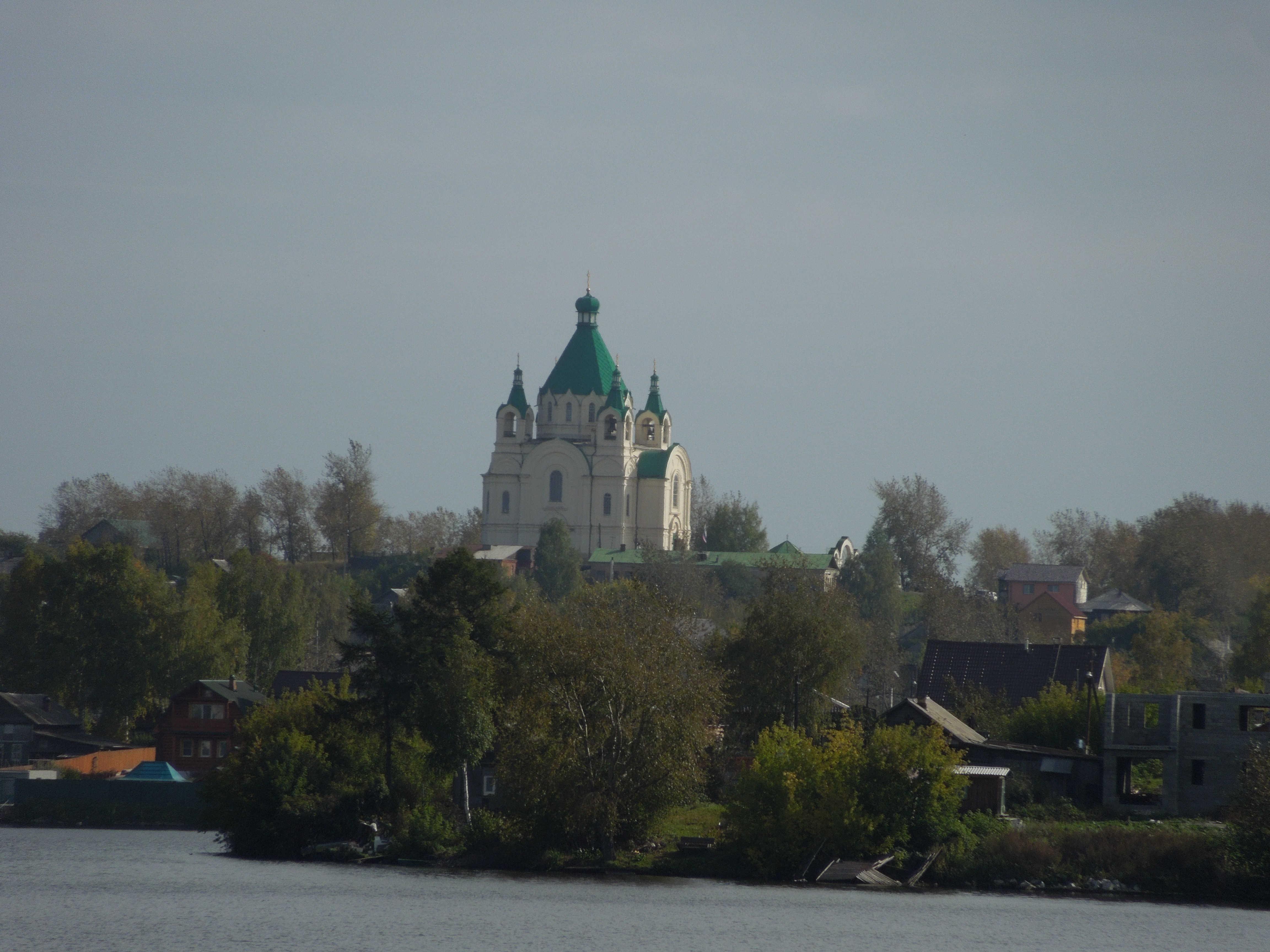 Церковь александра невского (Свердловская область, Нижний Тагил, р-н гальянки)